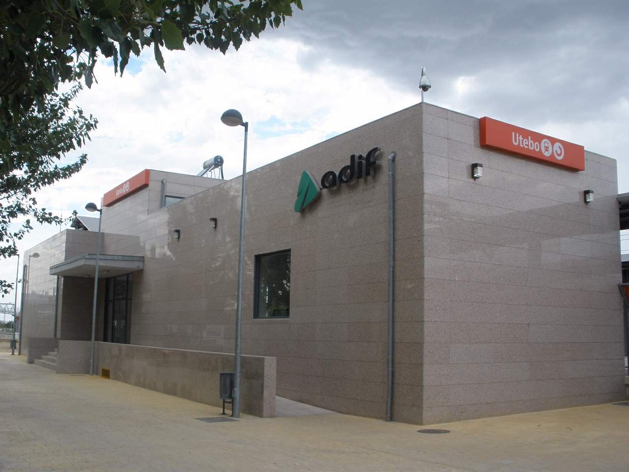 Estación de Cercanías de Utebo (Zaragoza)